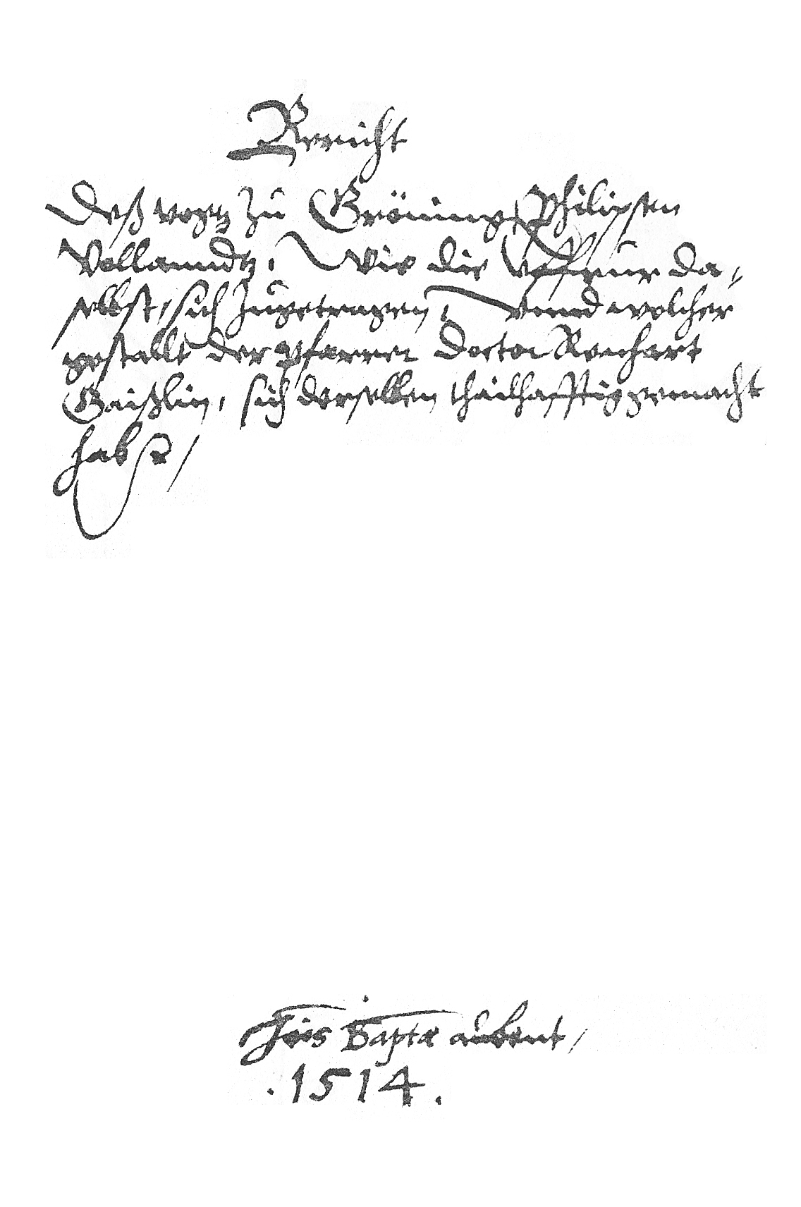 Titelseite des Gaißer-Dossiers von Philipp Volland, Vogt zu Grüningen, 1514 (Armer Konrad)